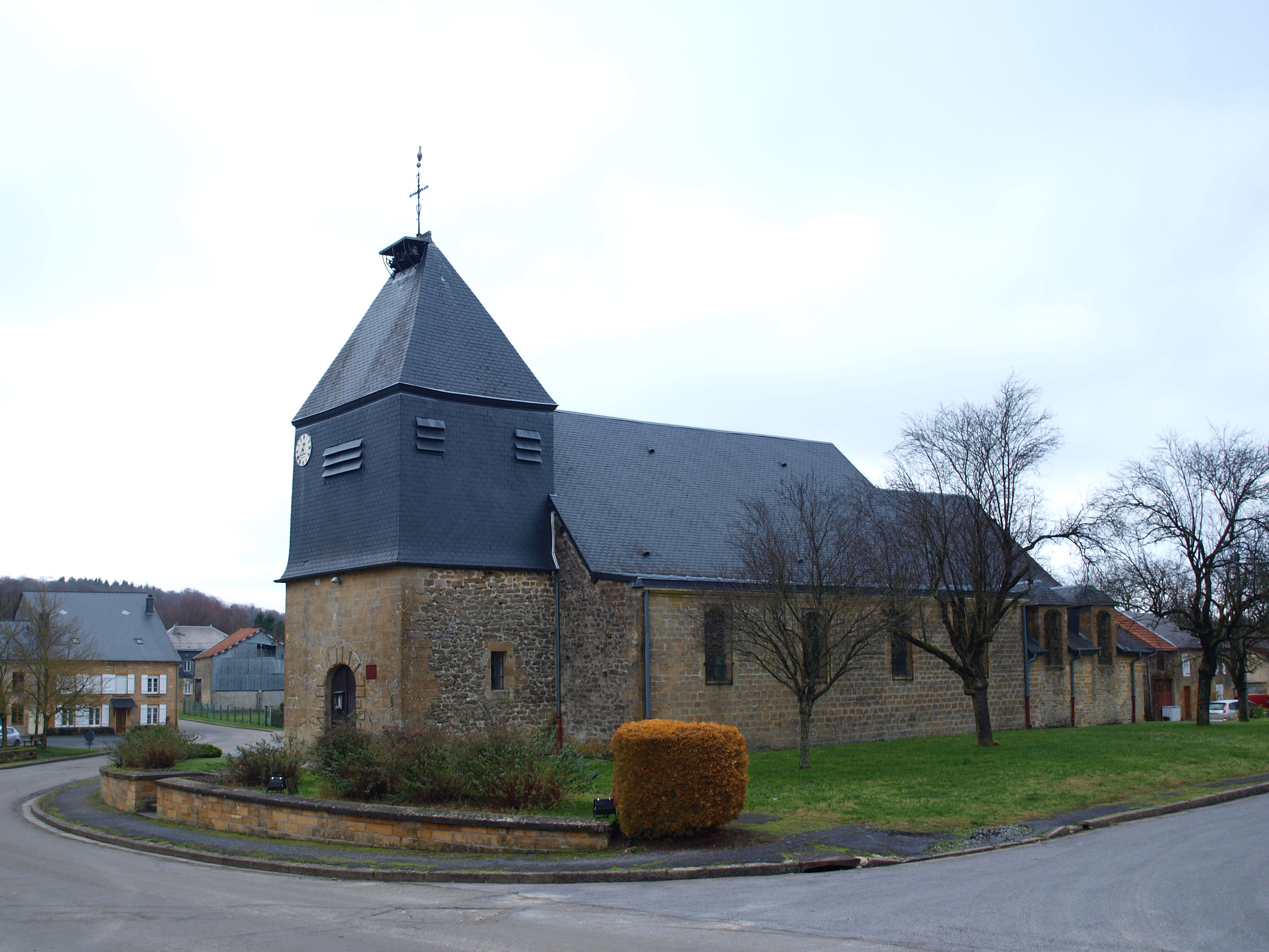 Sauville (Ardennes, France) ; l'église.